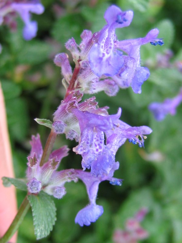 Blüte von Mussins Katzenminze Nepeta mussinii